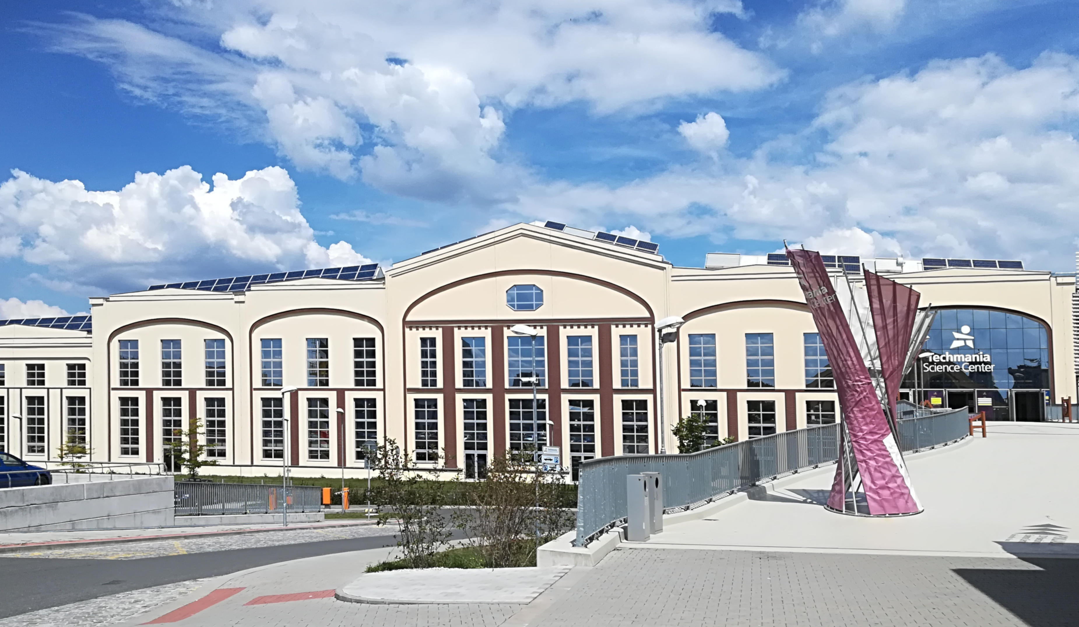 Exteriér Techmanie v Plzni